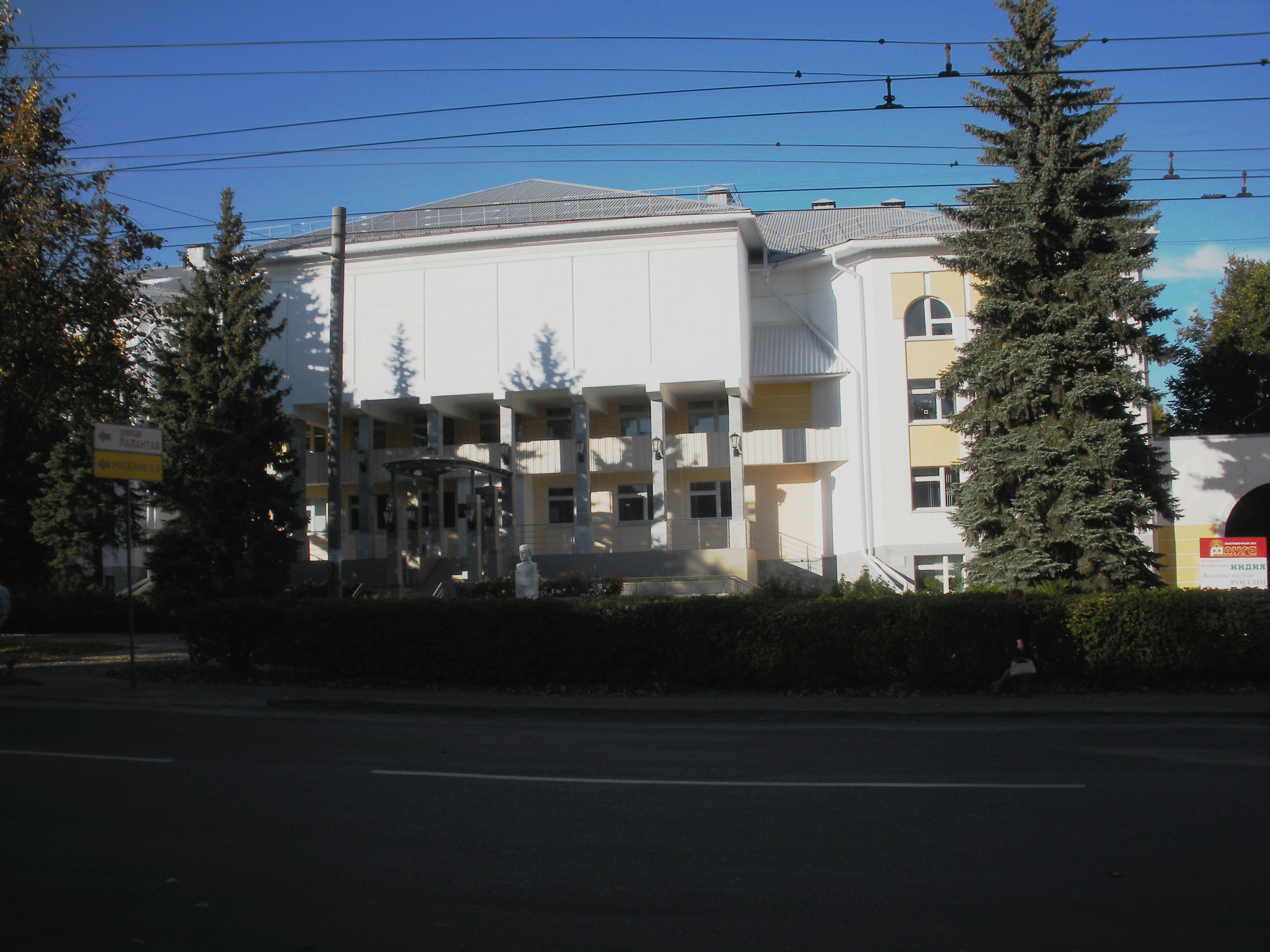 Библиотека республиканская: улица Пушкина, 28, Йошкар-Ола, Марий Эл